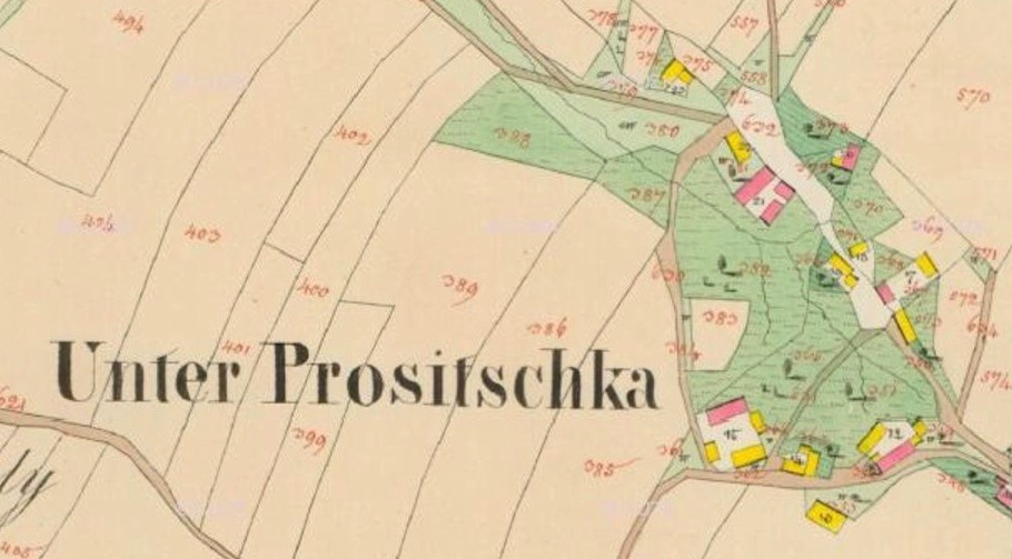 obec Dolní Prosíčka - část císařského otisku stabilního katastru 1838